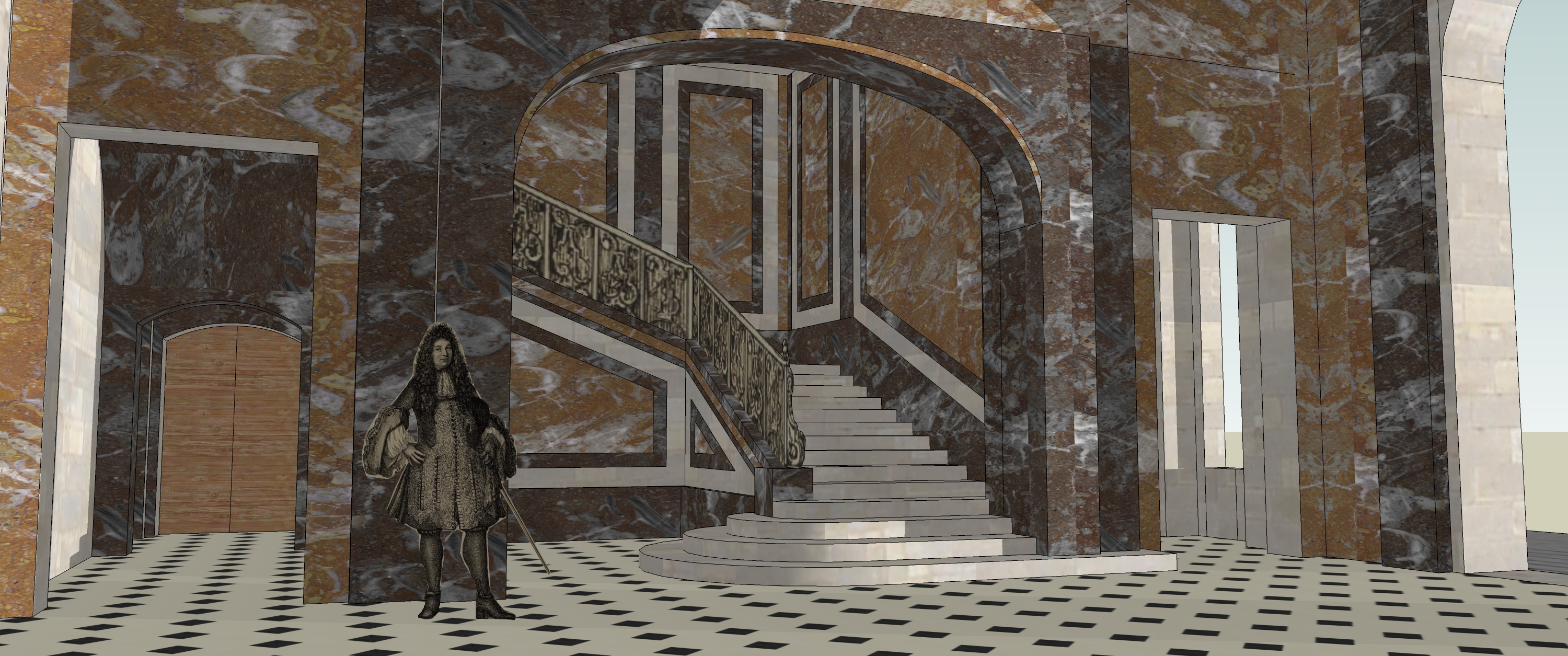 Schéma du vestibule et de l'escalier créé au temps de Louvois vers 1680-1690, mais détruit par Monseigneur vers 1699.